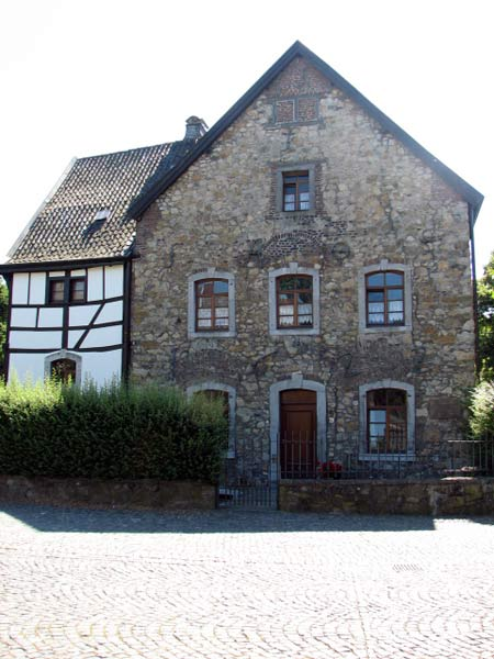 Pannhaus in Eilendorf (Aachen)